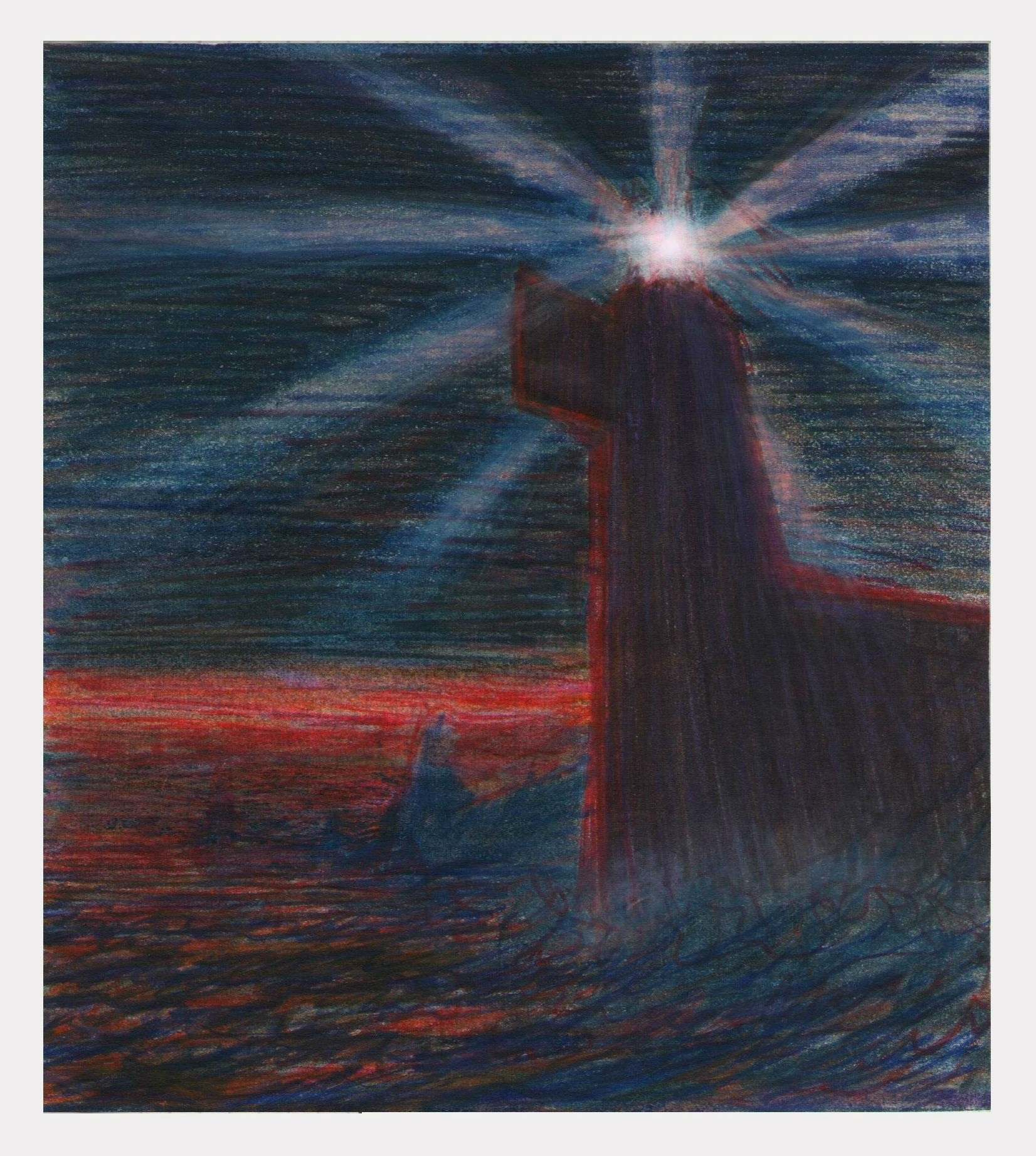 Monumento ai caduti delle guerre d'Africa (Arnaldo Dell'Ira,1903-1943),pastelli colorati su carta, 1936, collezione Archivio Dell'Ira